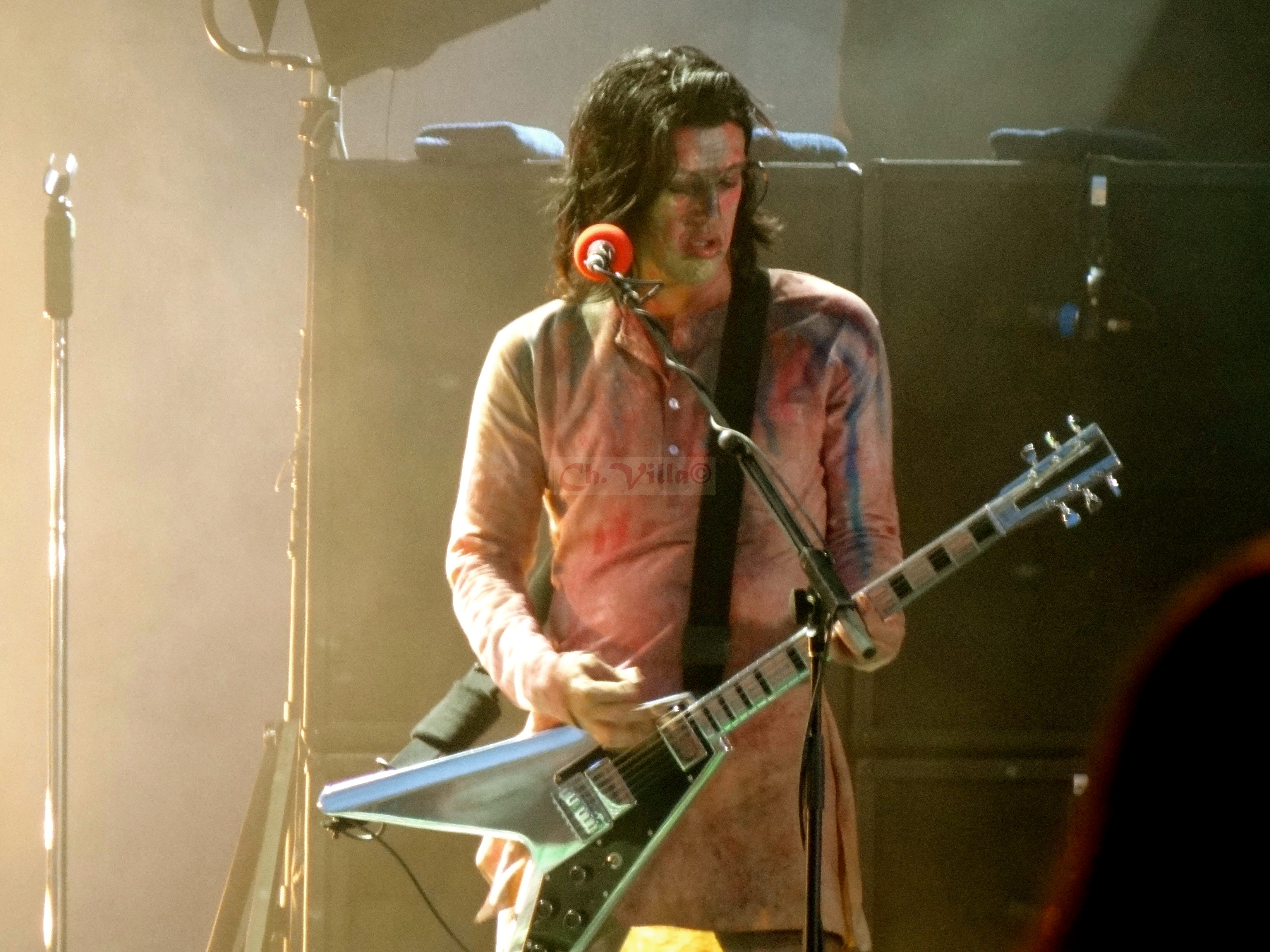 Twiggy en la gira Hey Cruel World... Tour.